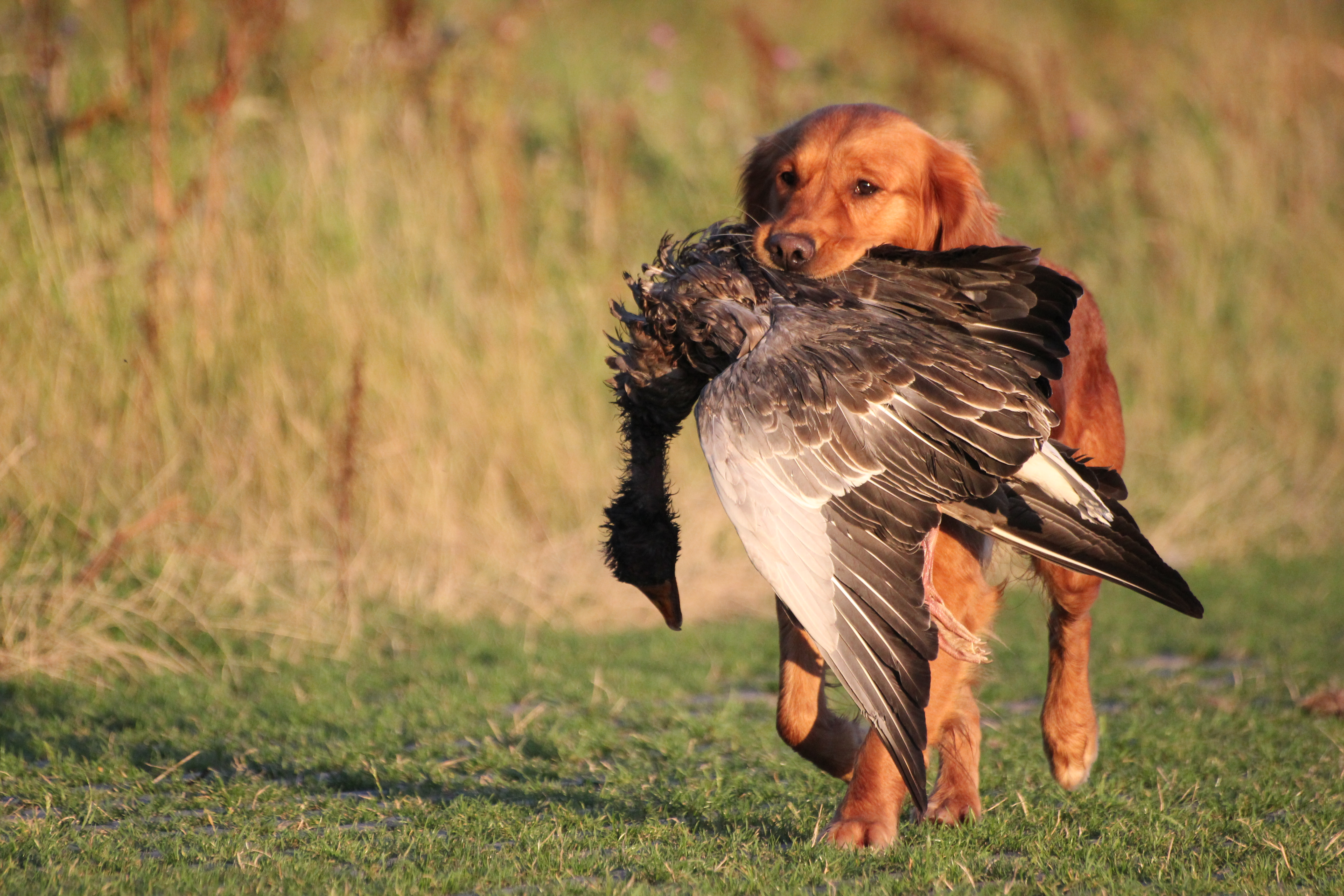 golden retriever, power of gold, adante power of gold